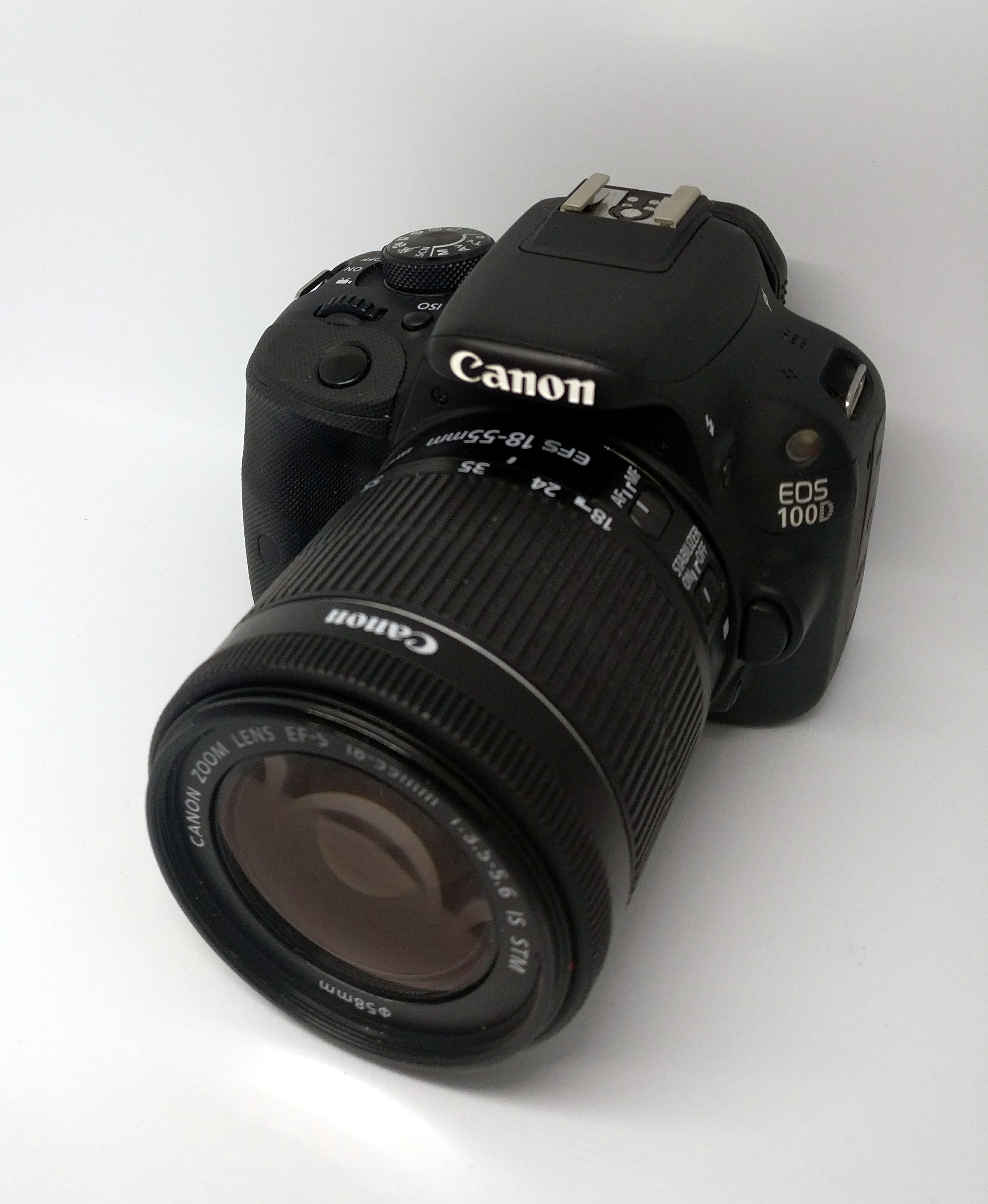 Canon EOS 100D camera